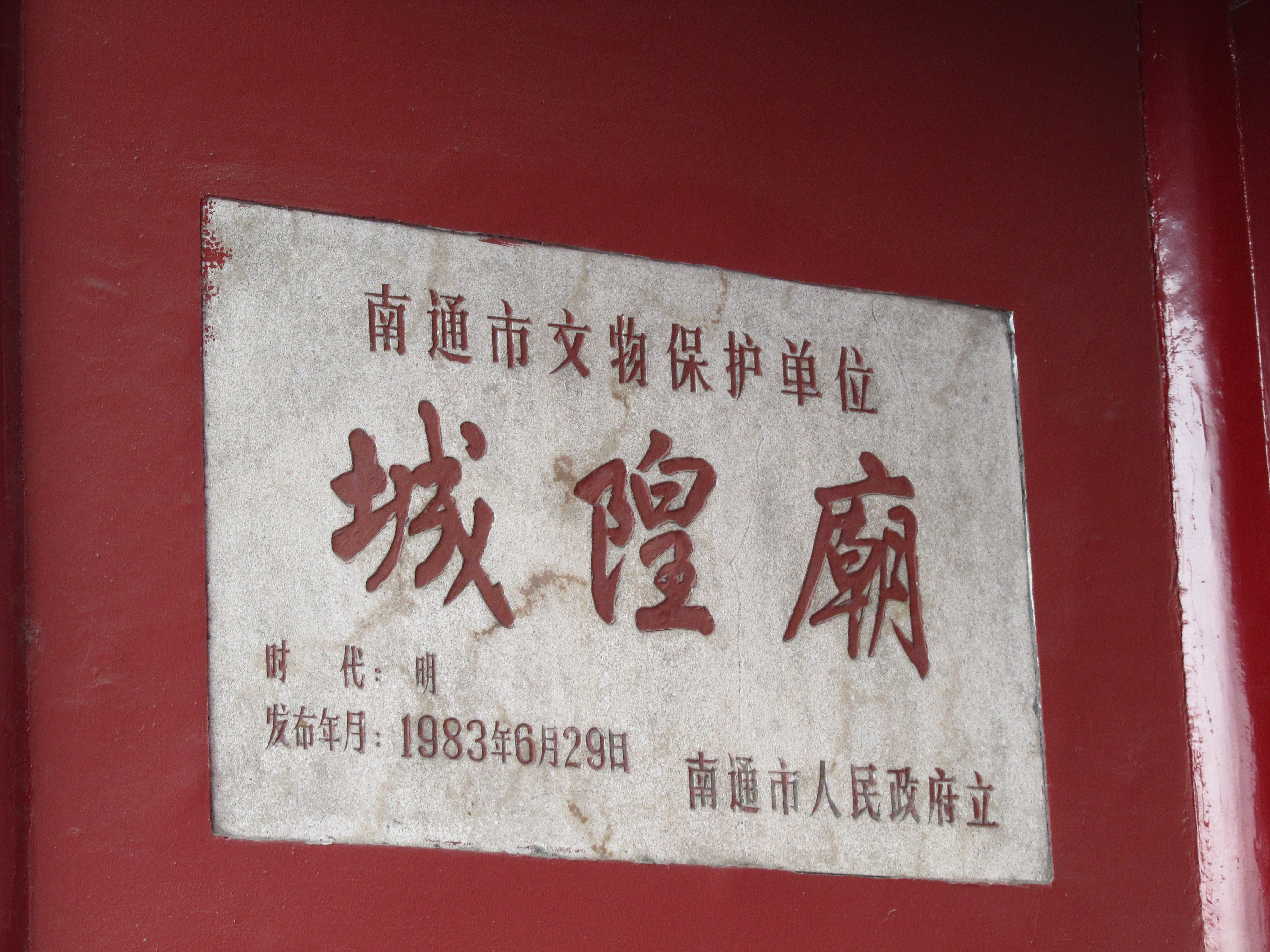 南通城隍庙，文保碑。